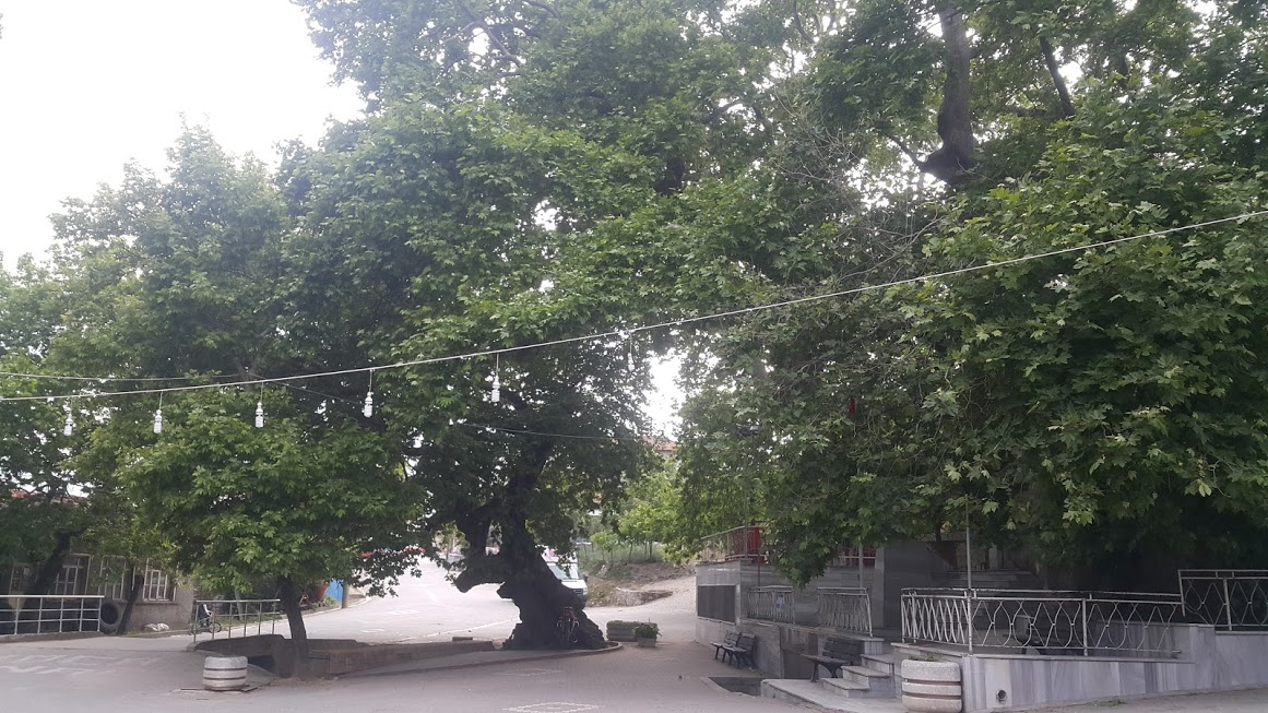 Kocapınar Köy Merkezi